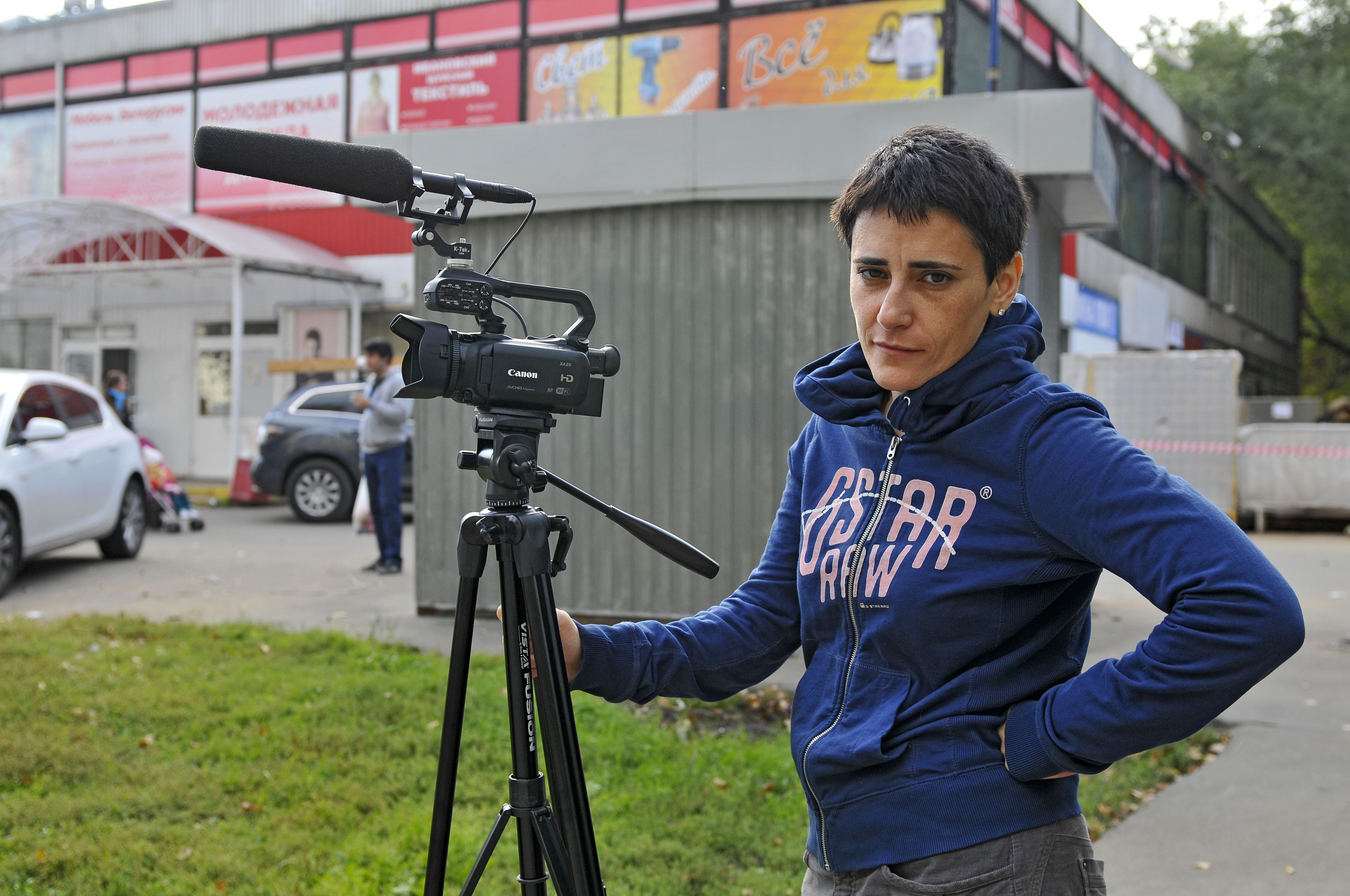 фото